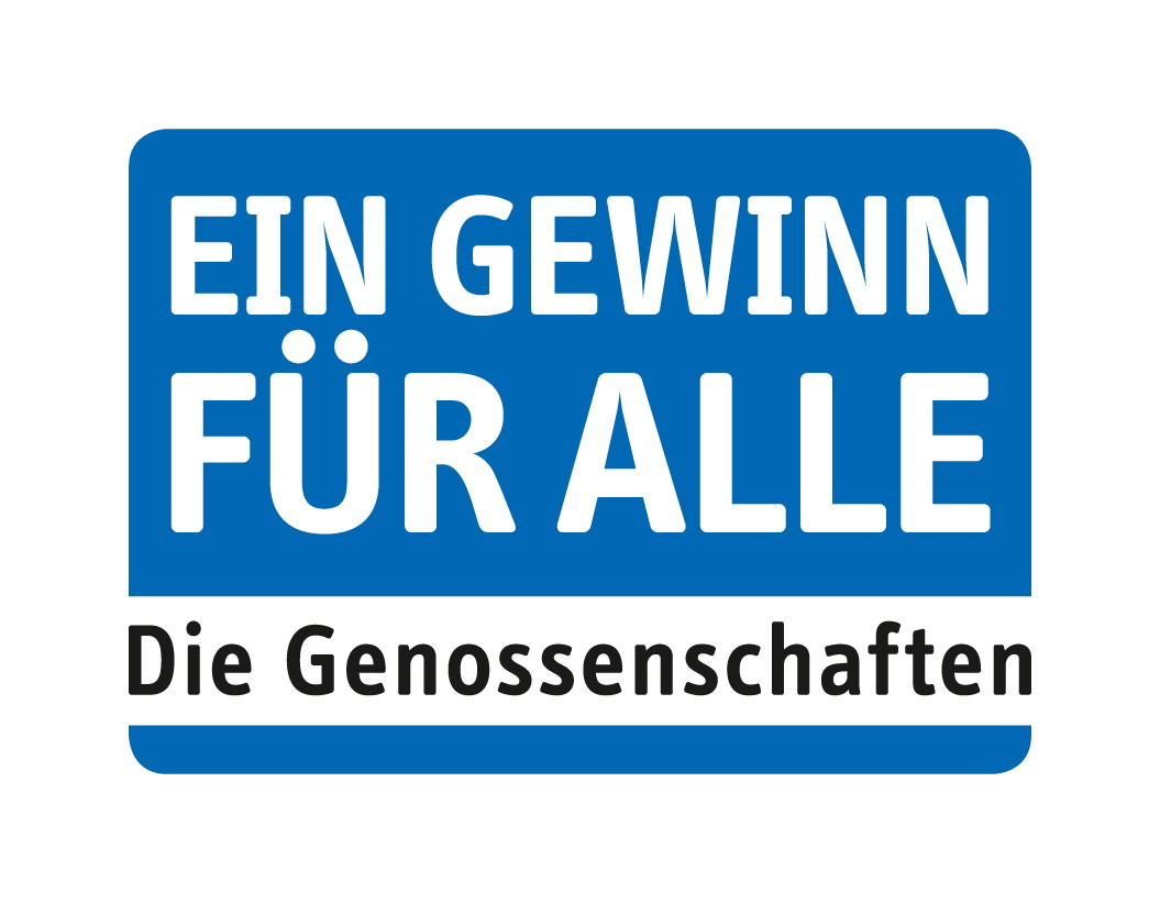 Logo des deutschen Programms zum Internationalen Jahr der Genossenschaften. Das Logo existiert in mehreren Farben.